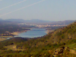 Vista general de Pasencia desde el Valle del Jerte